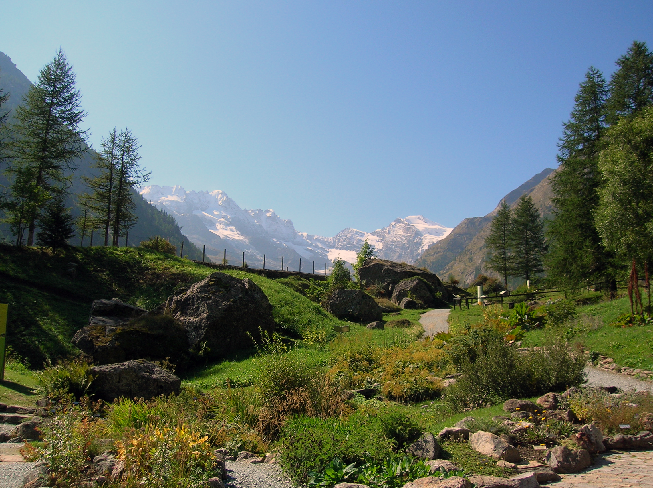 Gran Paradiso, visto dal Giardino botanico Paradisia, fraz. Valnontey, Cogne, Valle d'Aosta, Italia. This is a photo of a monument which is part of cultural heritage of Italy.